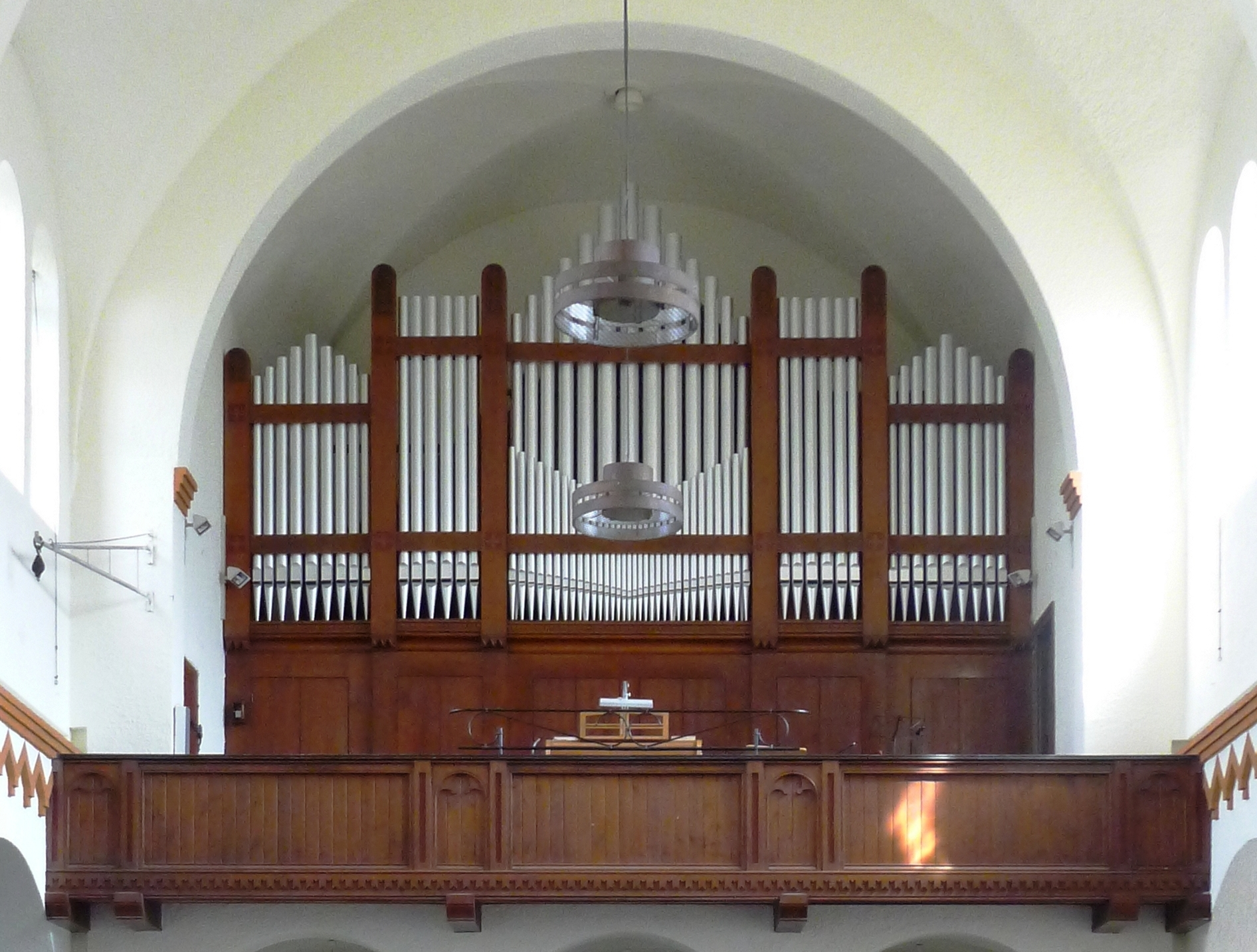 Orgelempore über der Eingangshalle und den seitlichen Kapellen